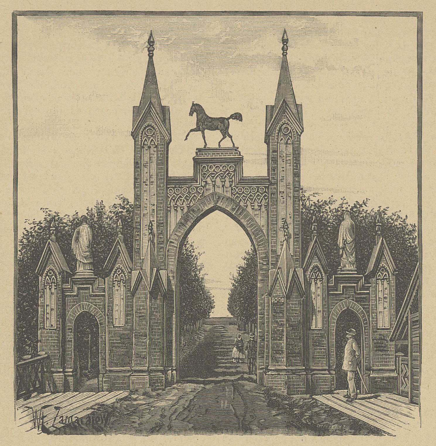 Беларуская (тарашкевіца): Ляндварова, сядзіба Тышкевічаў (Tyškievič). Брама